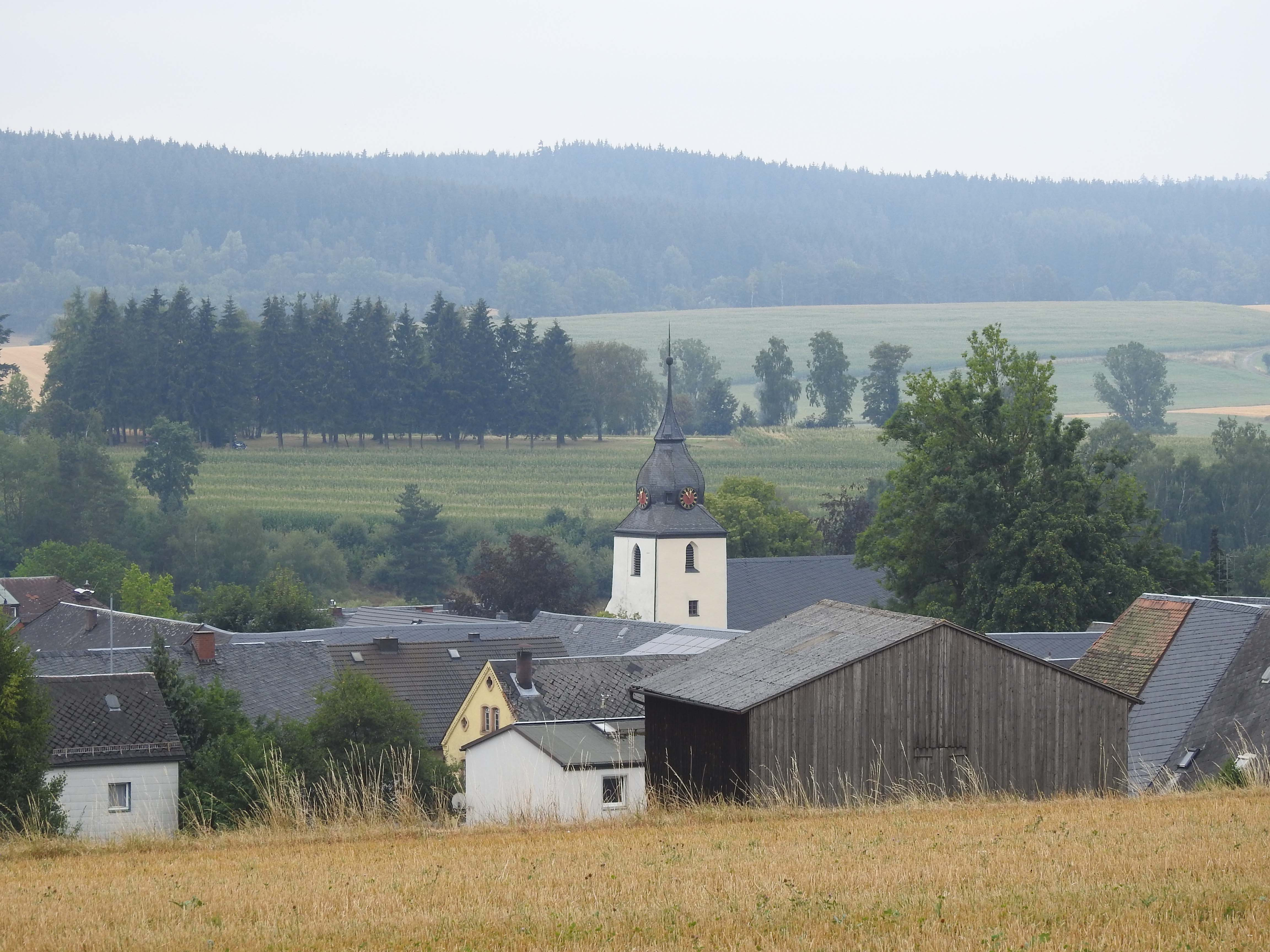 Röslau von Norden (Zwölfgipfelblick)